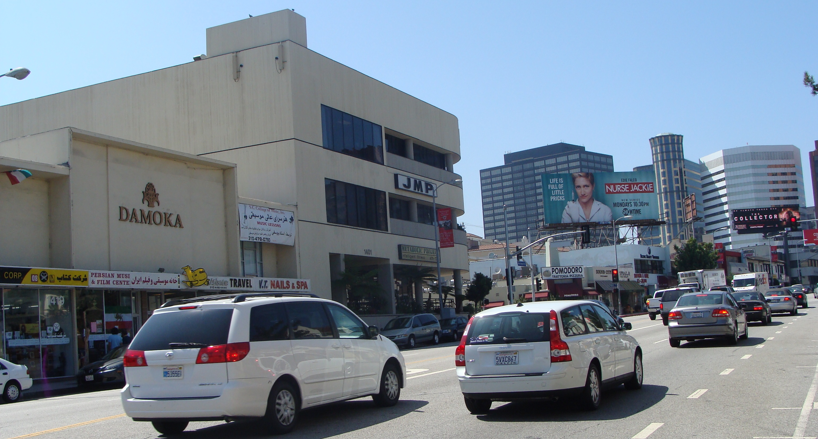 Tehrangeles, Westwood Blvd, Los Angeles.